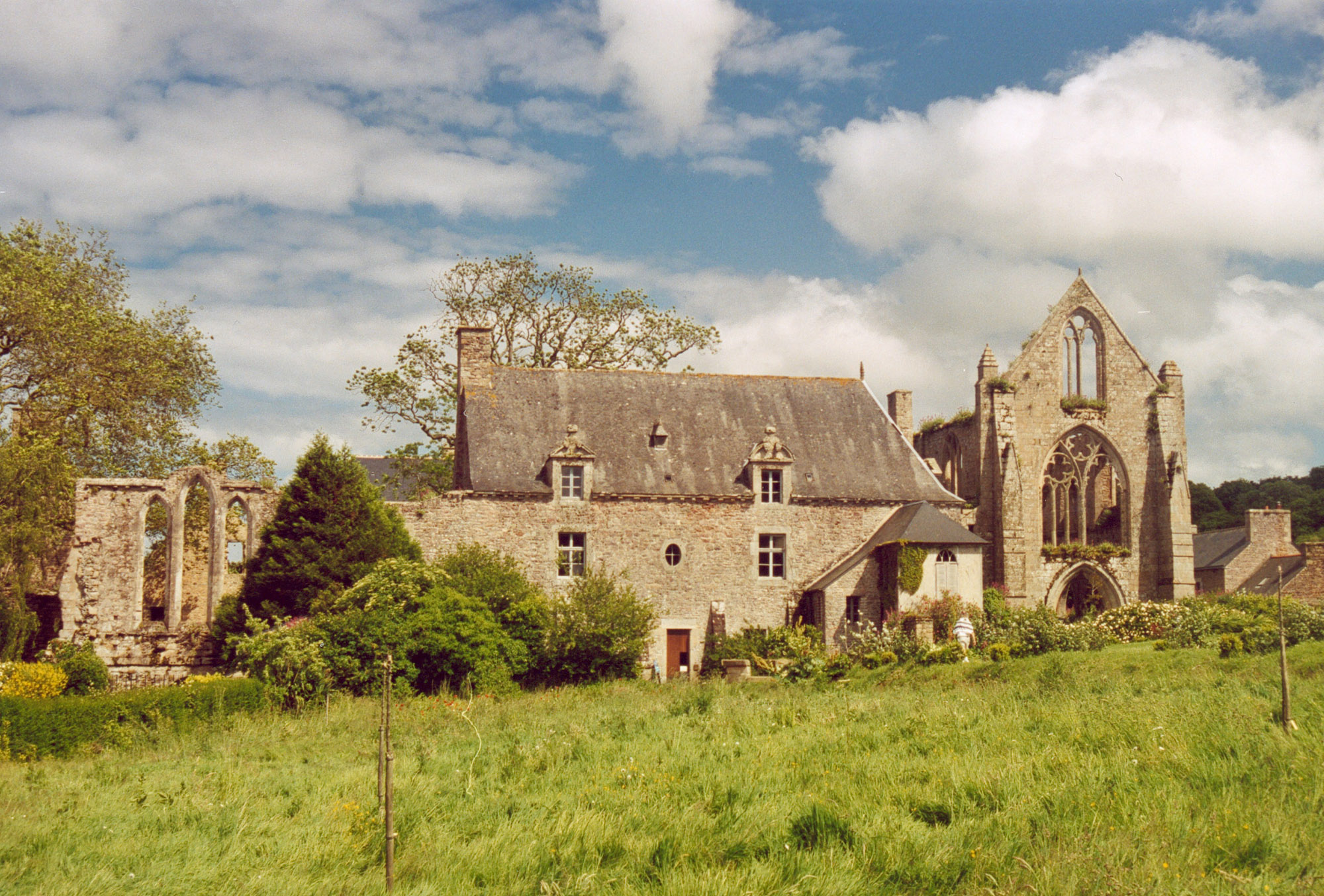 Bretagne Kérity Abbaye de Beauport Auteur : GIRAUD Patrick